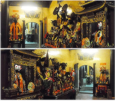 嘉邑城隍廟的神像